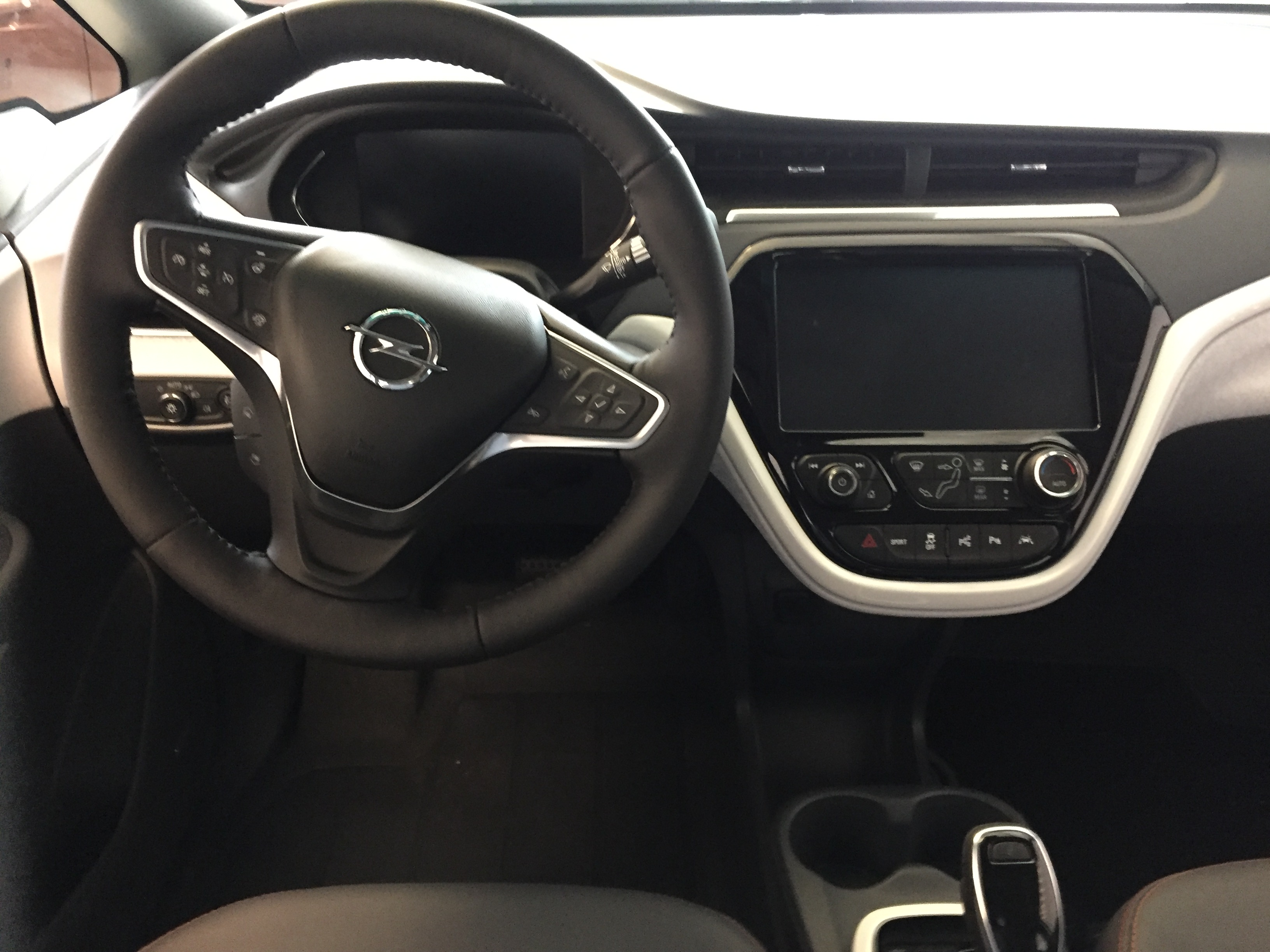 Opel Ampera e Cockpit